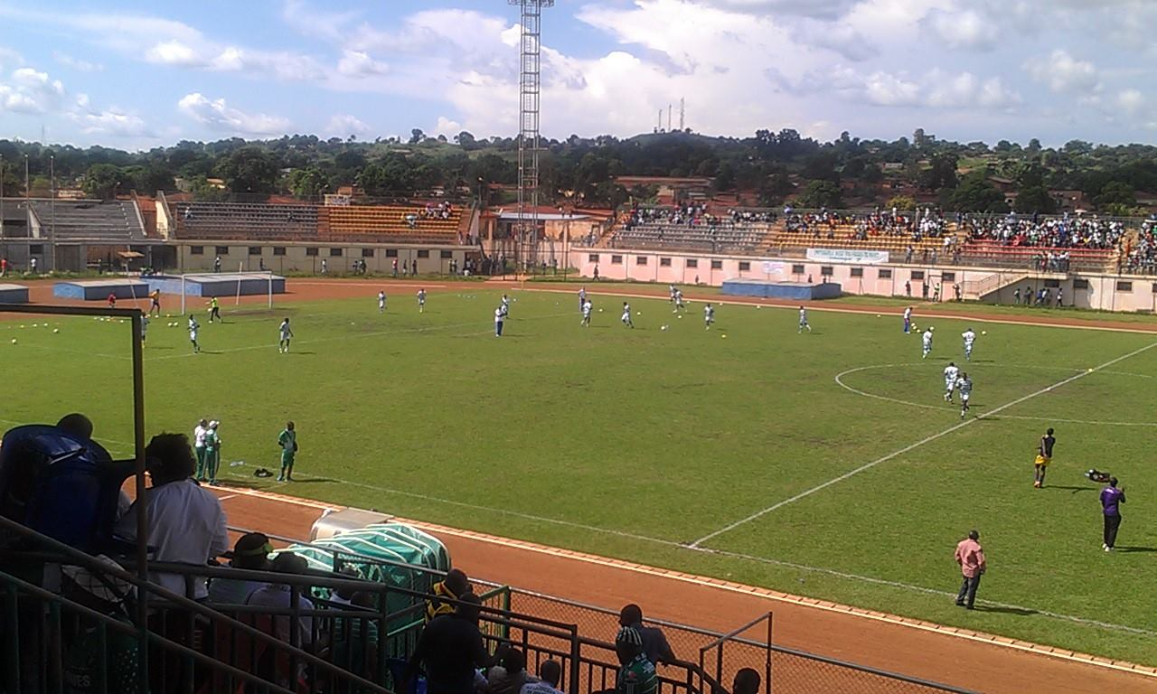 football